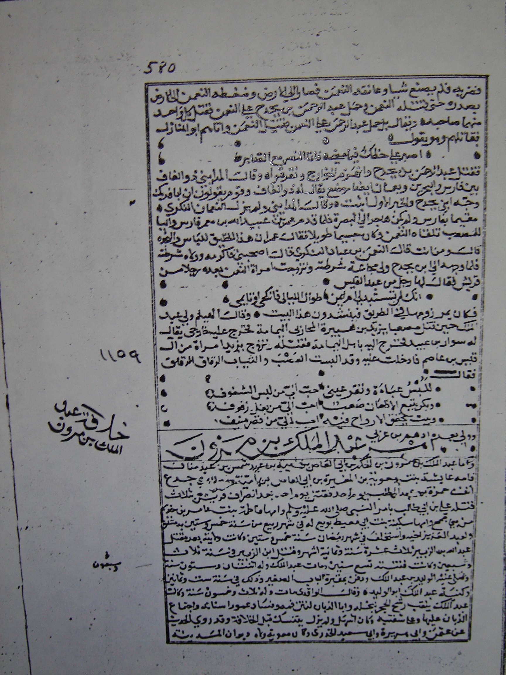 Blatt aus der Istanbuler Handschrift von al-Baladhuris Ansab al-ashraf